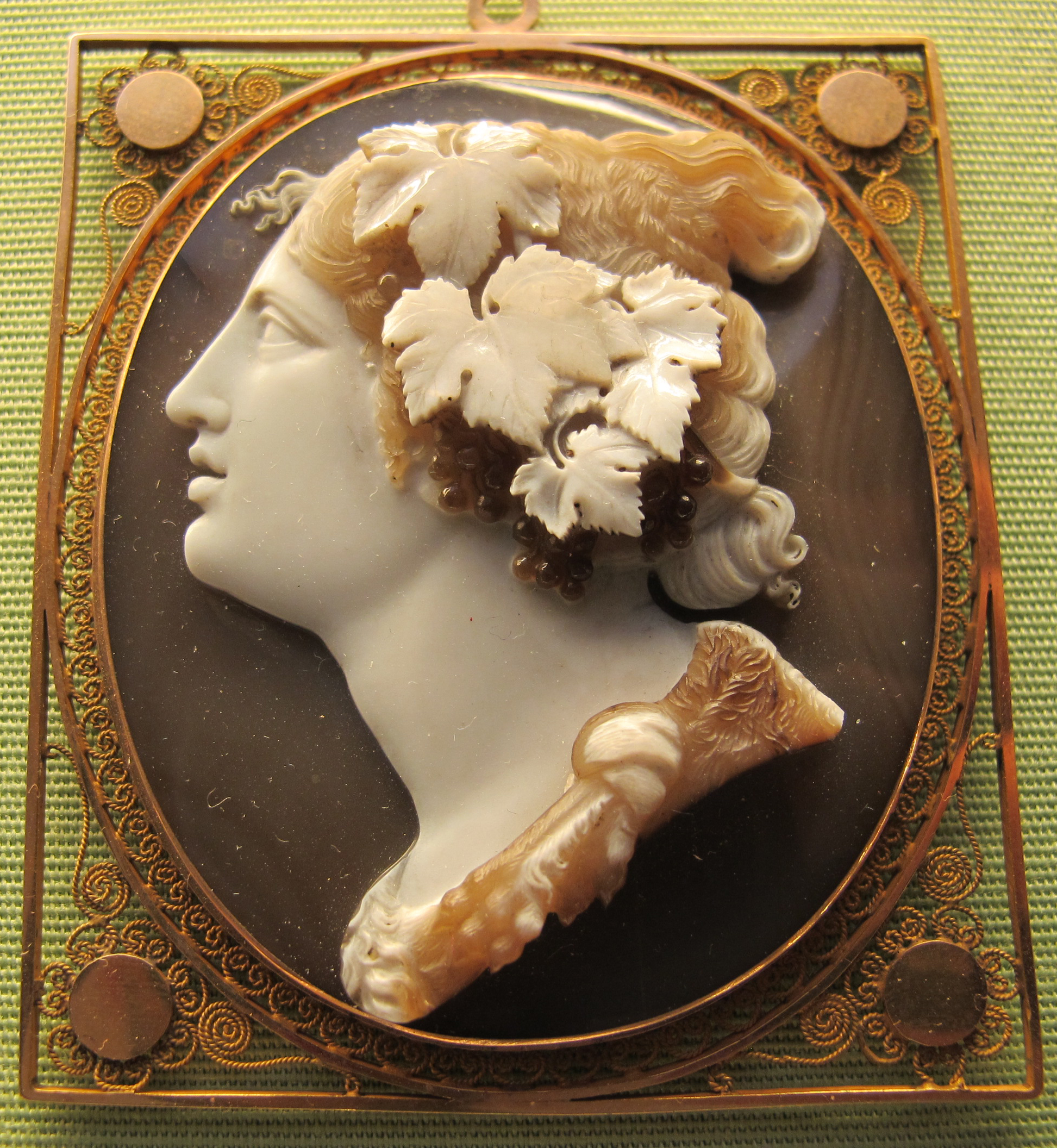 Benedetto pistrucci, menade, sardonice, 1810 ca